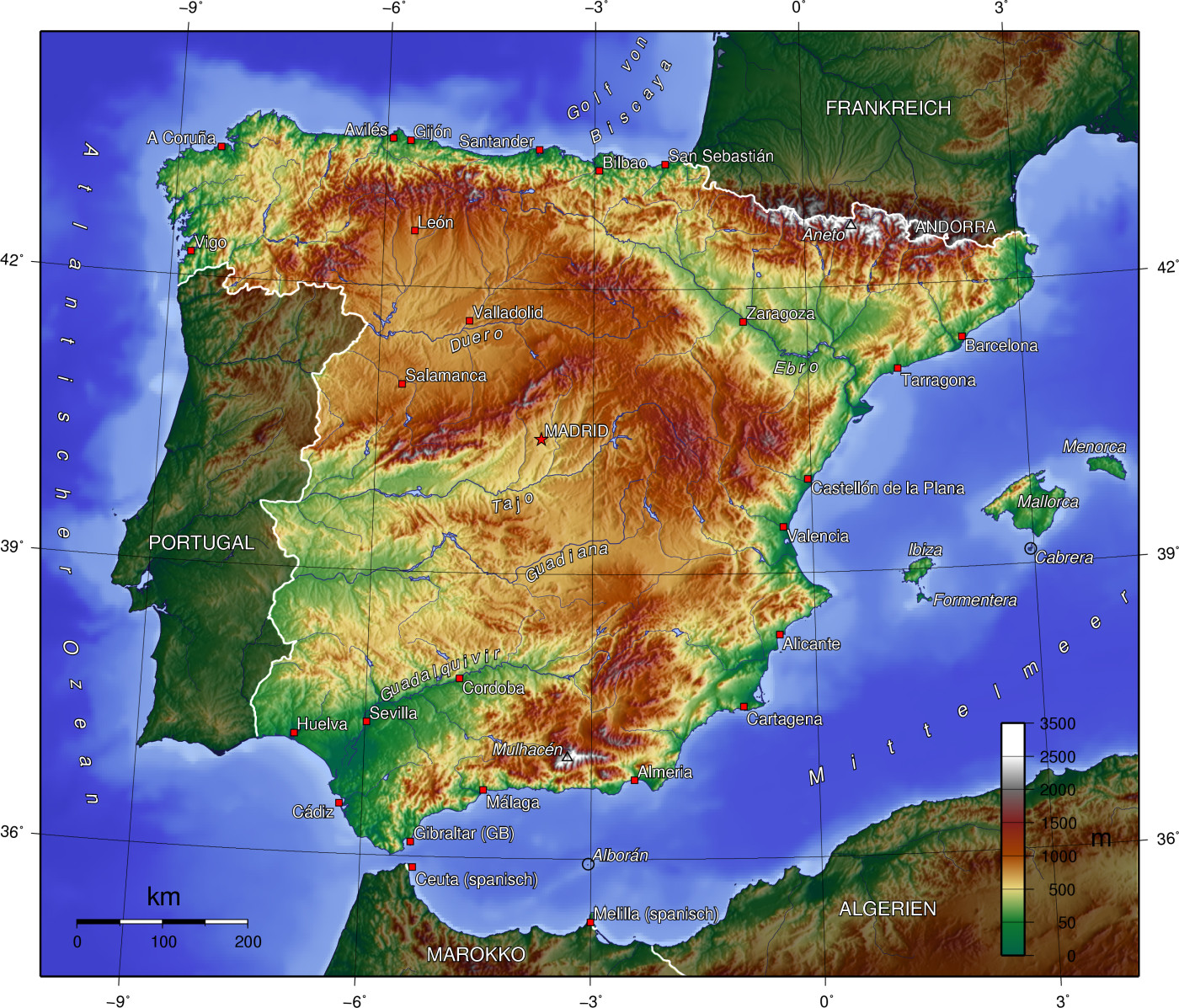 Topografische Karte von Spanien